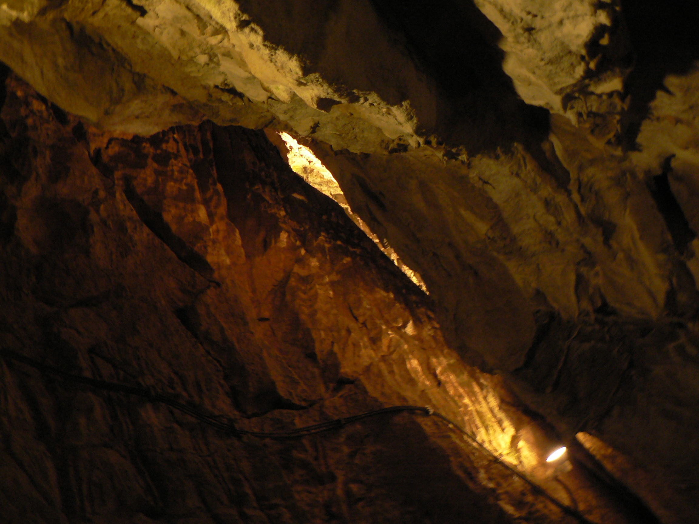 Fragment Jaskinii Mroźnej w Dolinie Koscieliskiej w Tatrzańskim PN